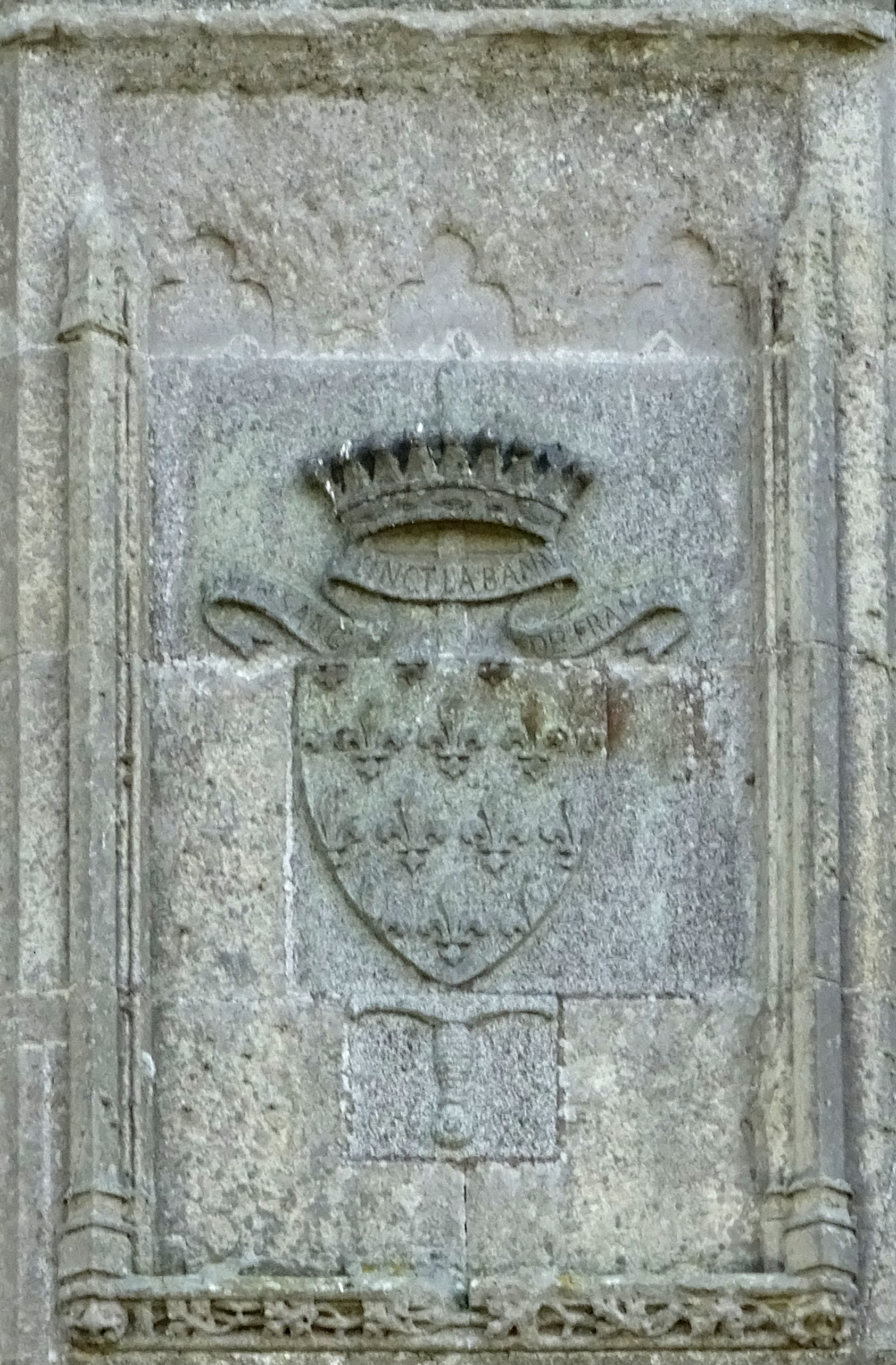 Château de Combourg - Blason des Chateaubriand sur la façade de l'entrée